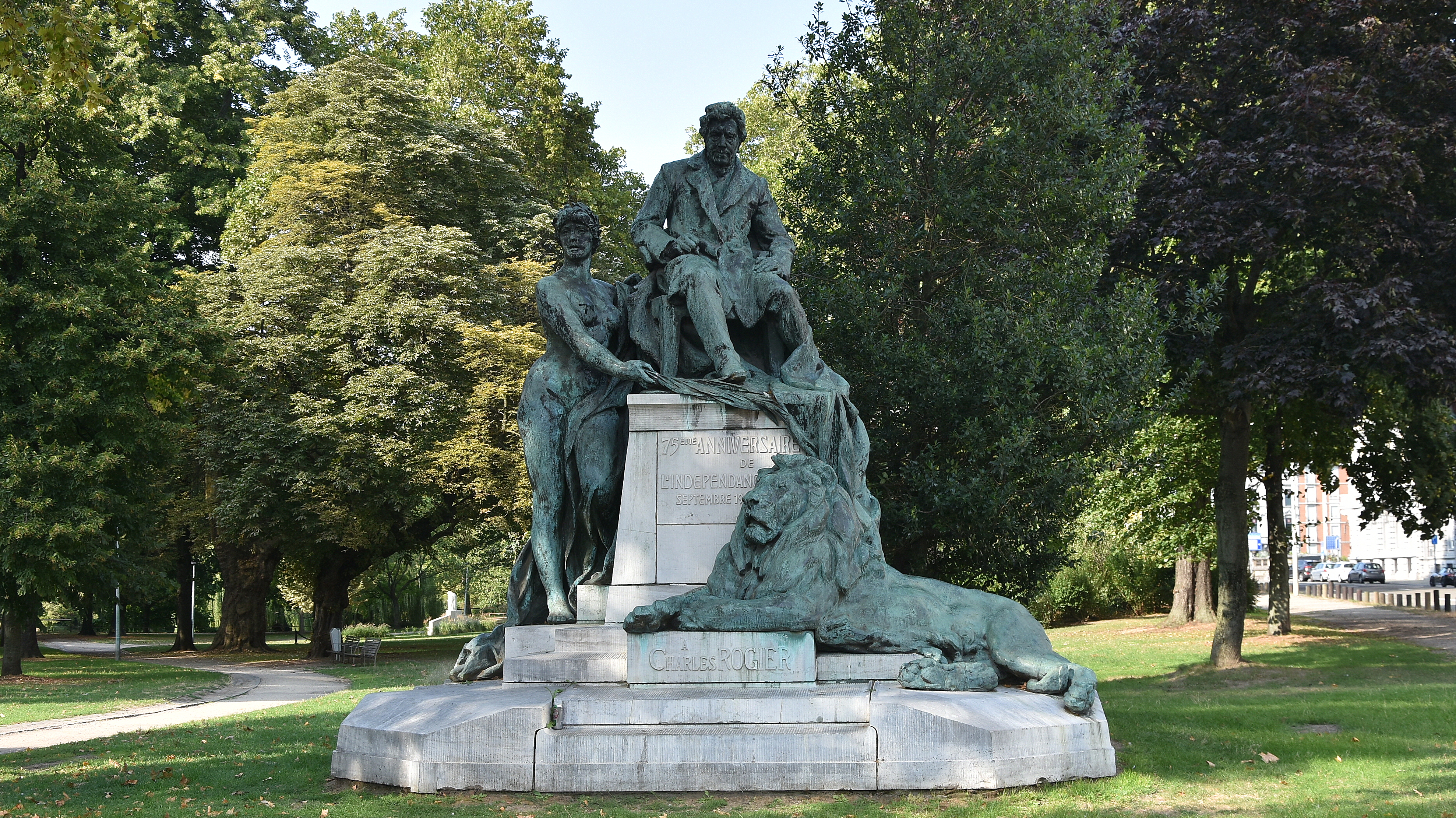 Camille-Marc Sturbelle (1873-1944) Standbeeld Charles Rogier (1905) Luik This photo of immovable heritage has been taken in the Walloon Region